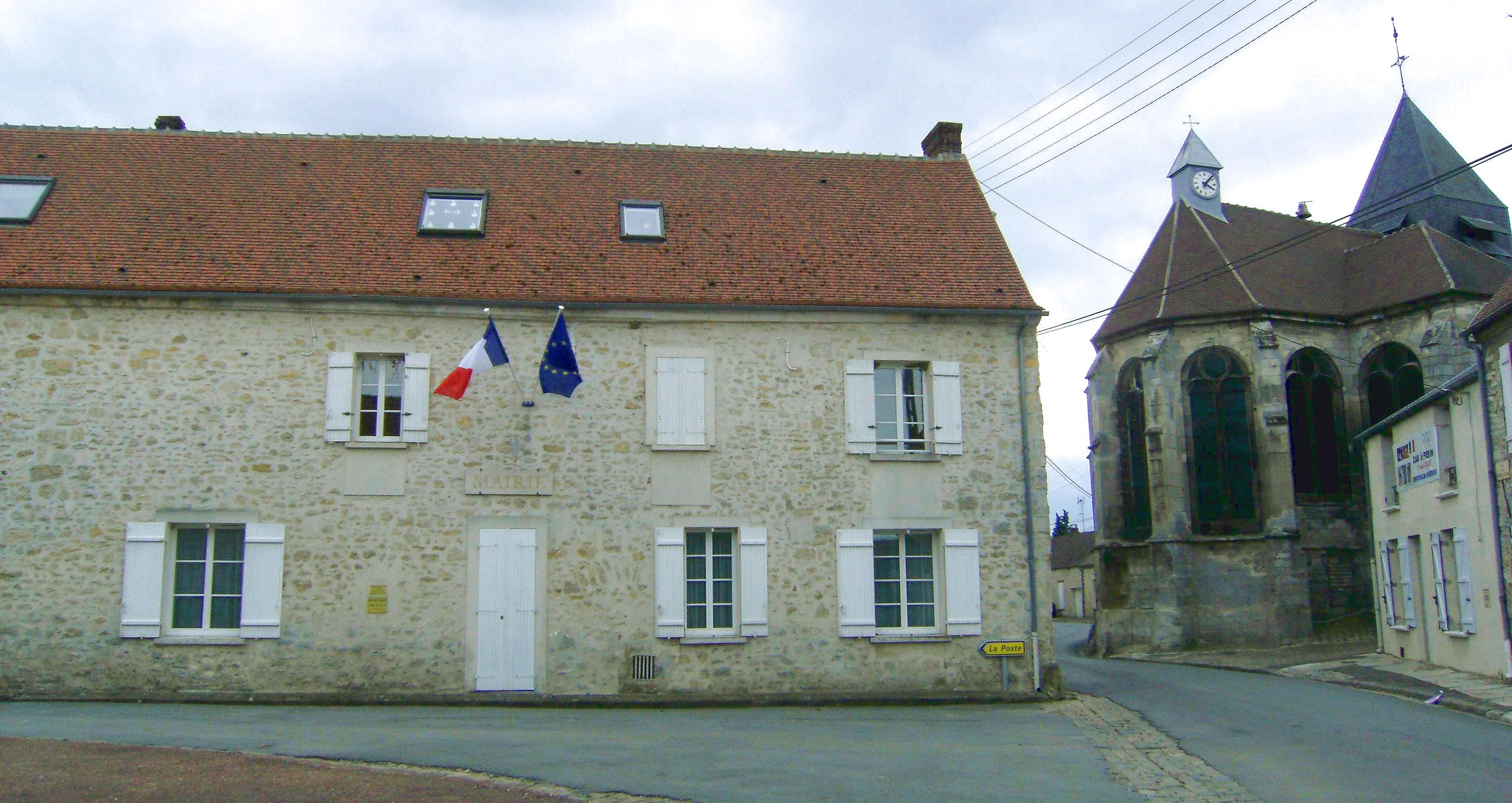 Mairie de Barbery (60 - Oise) et vue partielle de l'arrière de l'église de Barbery.